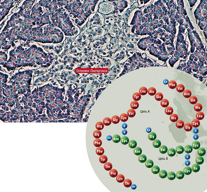 Молекула гормона инсулина образована двумя полипептидными цепями, которые соединены дисульфидными мостиками (S—S). Инсулин вырабатывается бета-клетками островков Лангерганса поджелудочной железы.